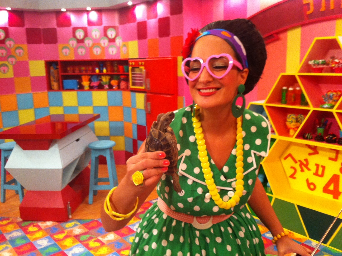 "מרמלדה " מתוכנית הילדים "מותק של יומהולדת "- HOT-VOD מפיקים סולן-יוכלמן אשר.